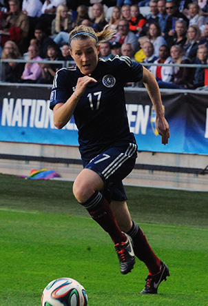 a_55_1795